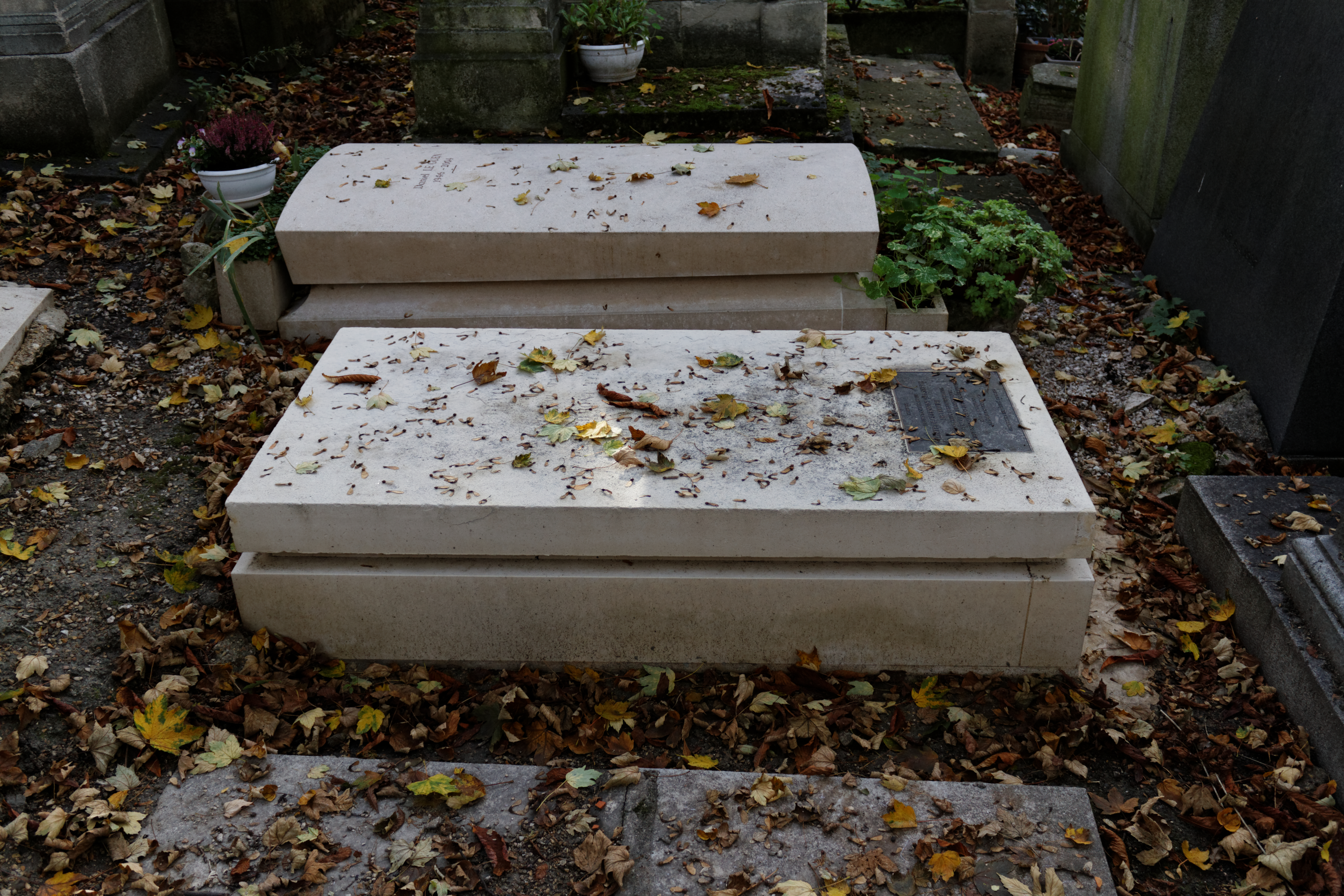 Vue d'ensemble